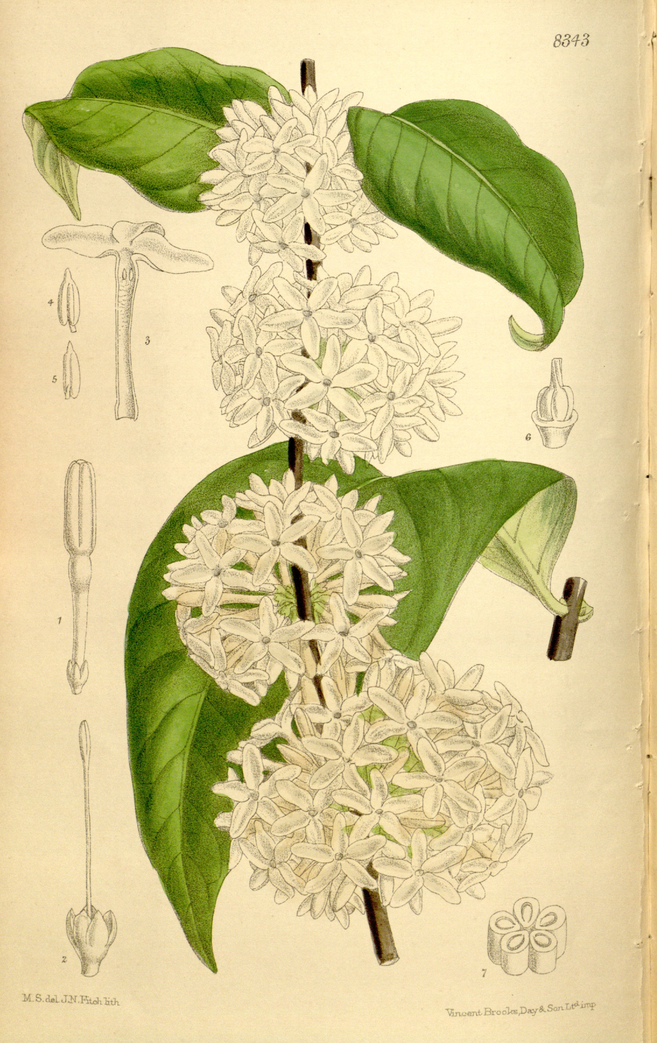 Pleiocarpa mutica, Apocynaceae